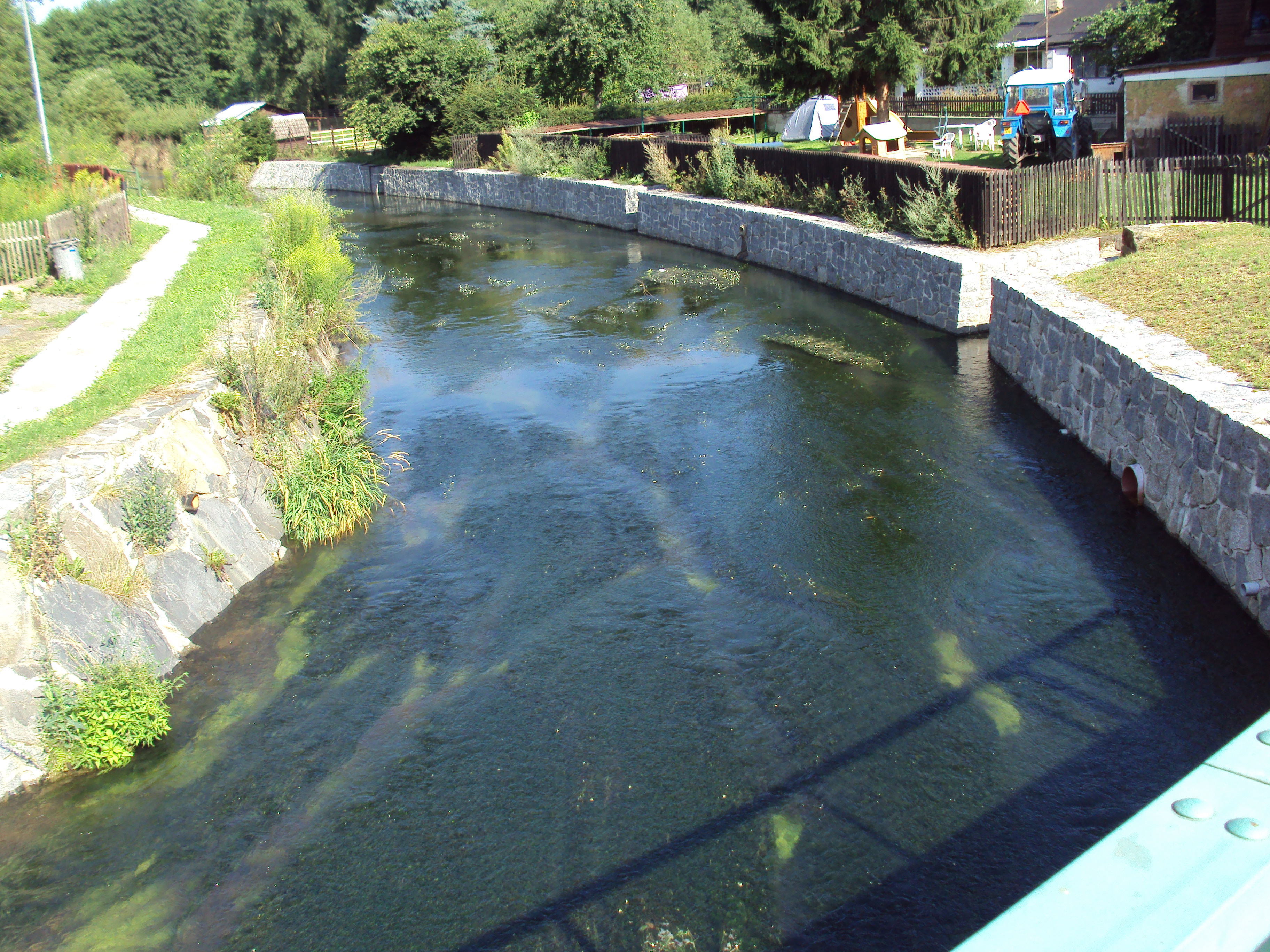 Panenský potok v Mimoni před vtokem do Ploučnice, pohled z mostu Lužické ulice proti proudu.